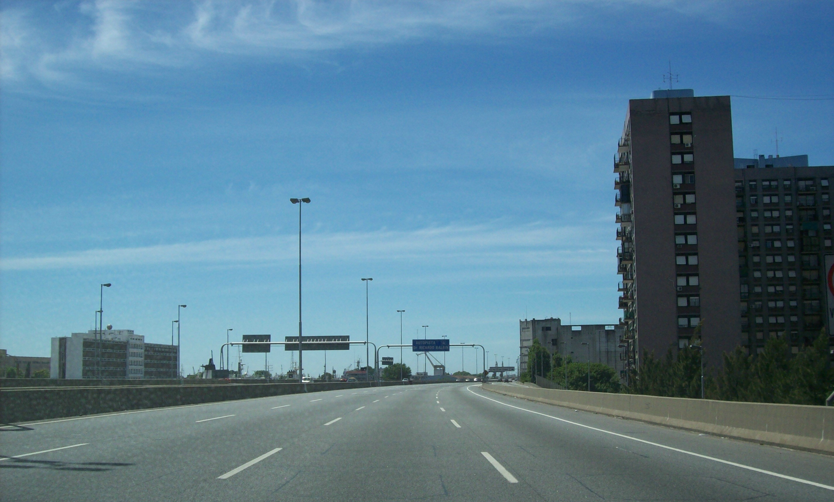 Autopista Buenos Aires - La Plata (Ruta Nacional 1) en su paso por el barrio de La Boca, en la Ciudad de Buenos Aires, Argentina.